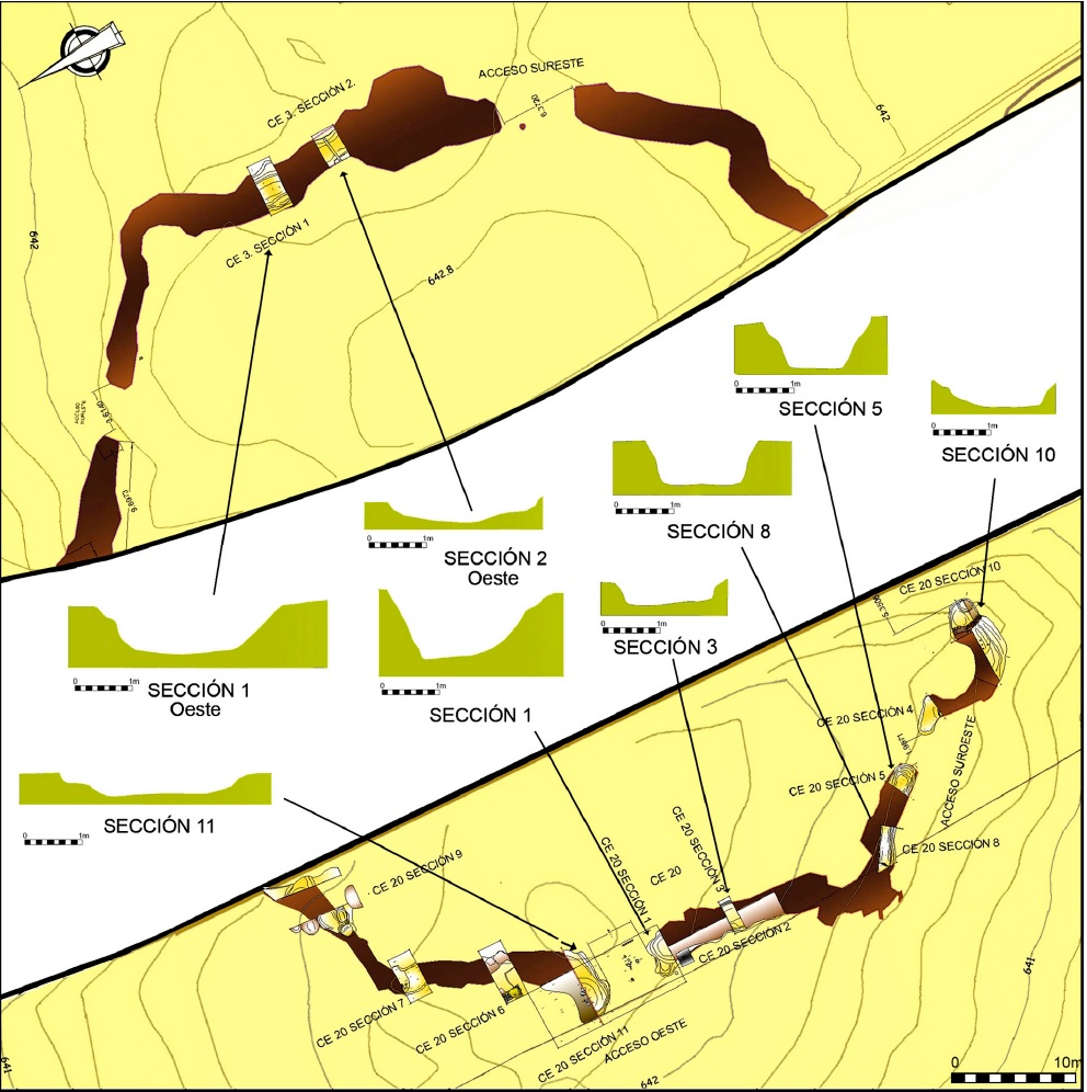 Planta general del foso del poblado calcolítico “Venta del Rapa” (Mancha Real, Jaén) con la localización de las secciones realizadas.